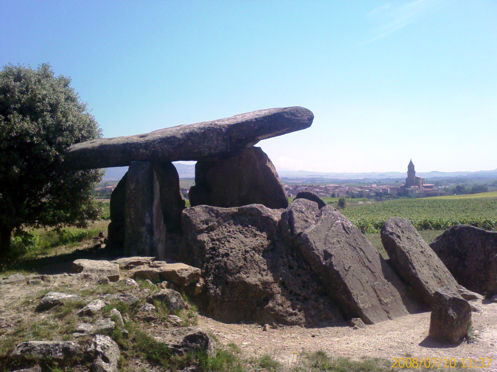 Monumento prehistórico